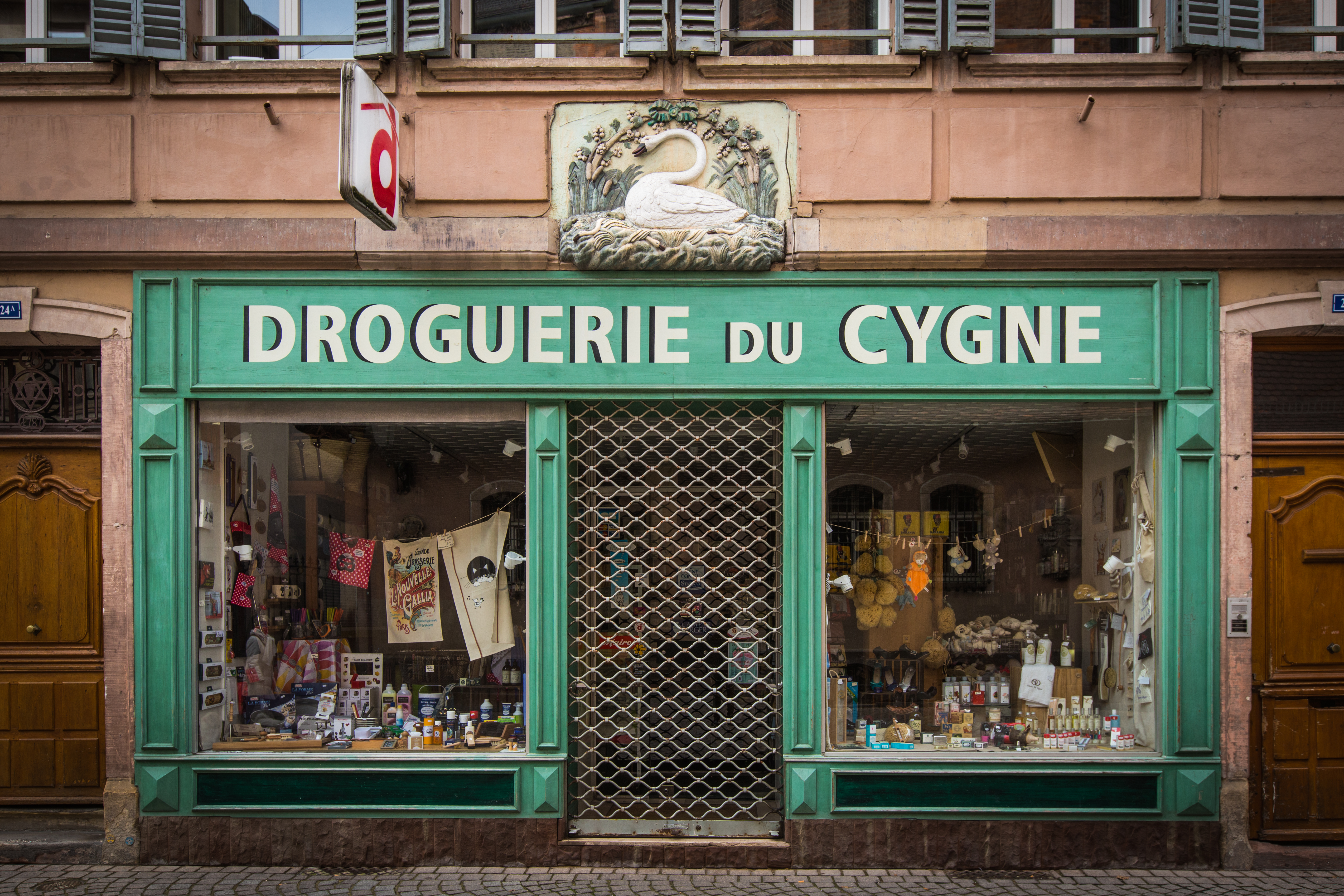 Strasbourg 24 Grand Rue droguerie du Cygne octobre 2013